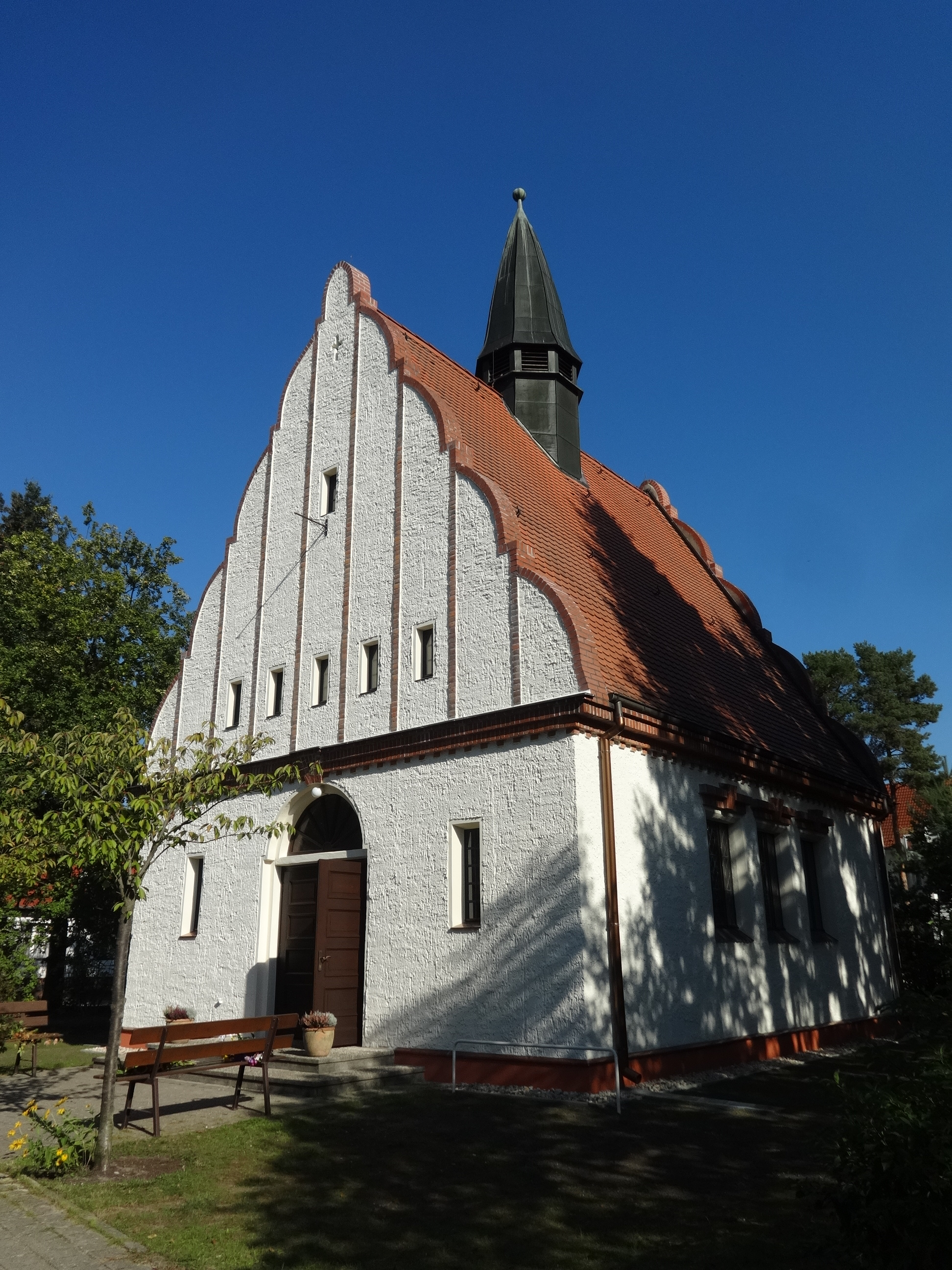 Die Evangelische Kirche wurde im Jahr 1922 eingeweiht und geht auf einen Entwurf Emil Kopps zurück. In der Kirche heiratete am 22. Juli 1933 Max Schmeling seine Verlobte Anny Ondra. In der Altarwand sind Glasfenster eingelassen, die die vier Evangelisten zeigen.